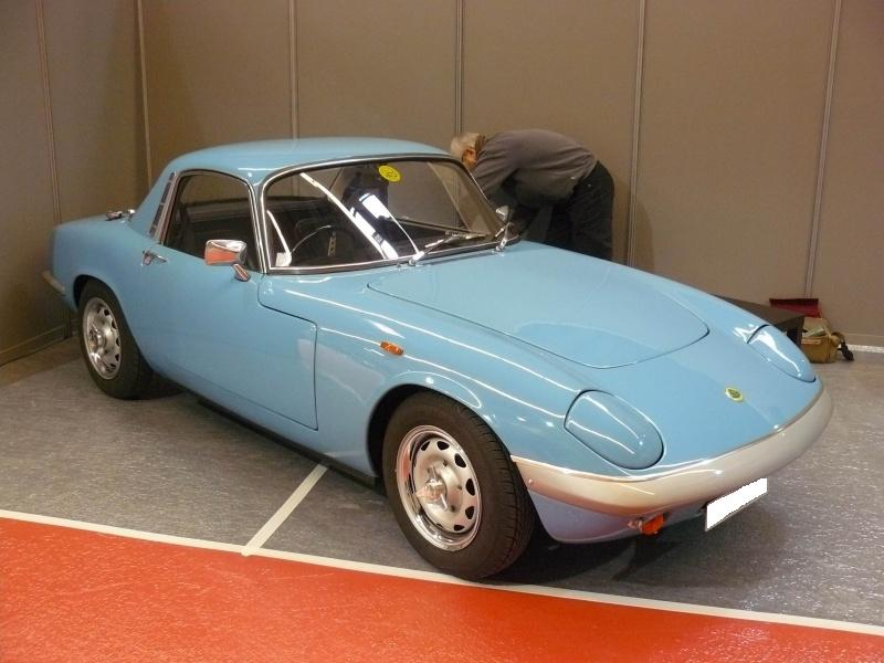 Retromobile 2012